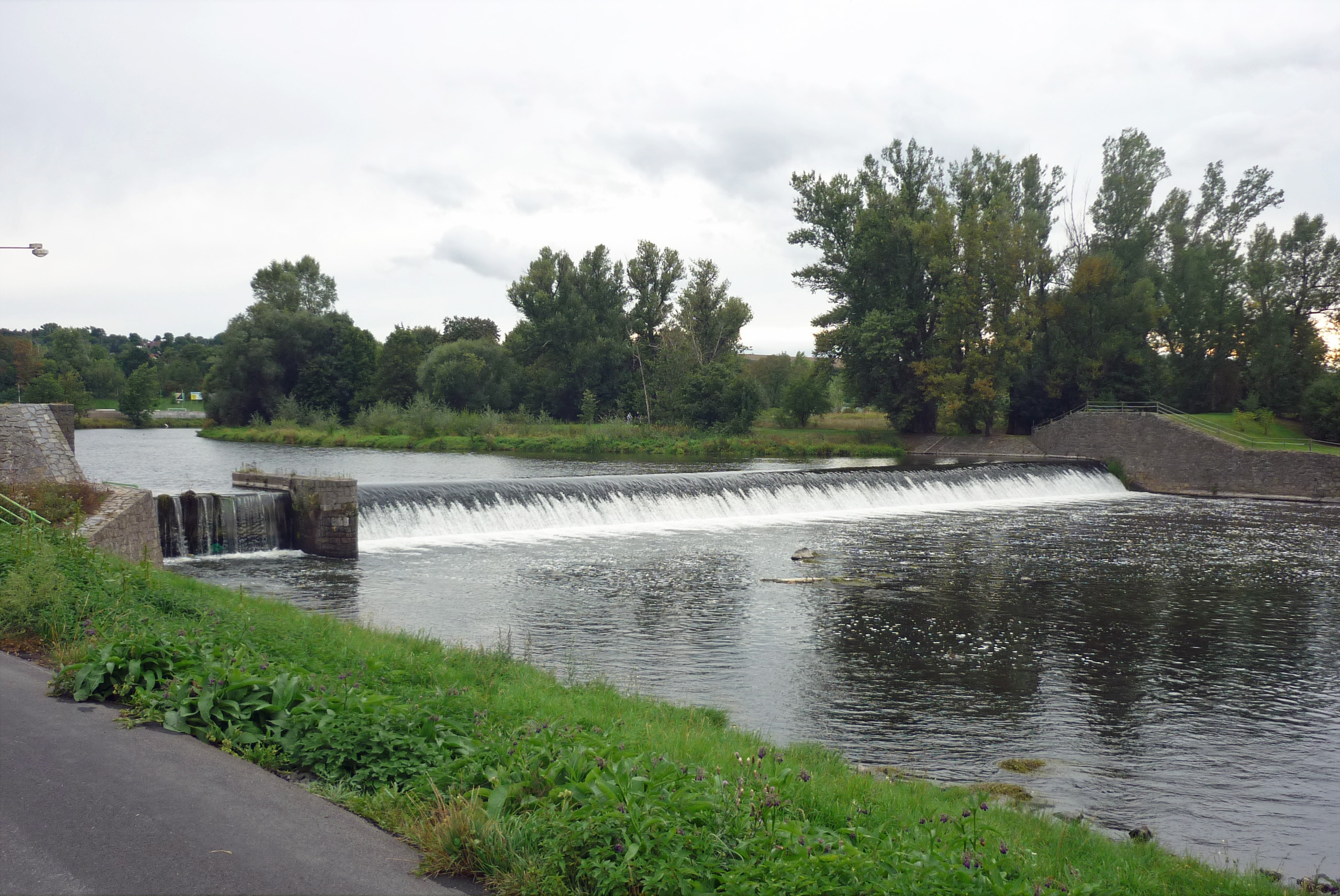 Egerwehr in Saaz/Žatec, hier war der Anfang des Saazer Mühlgrabens